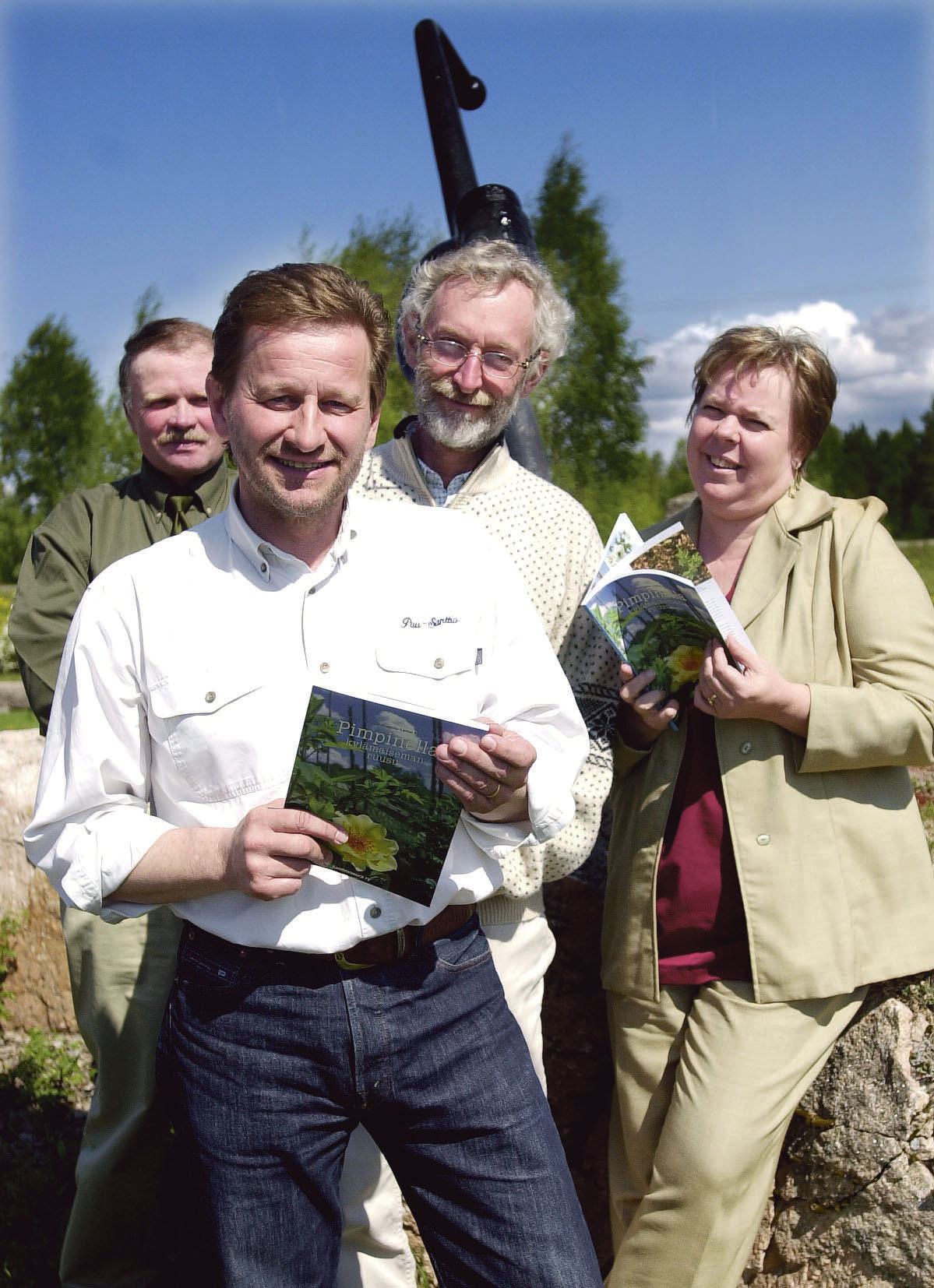 Ruusukirjan tekijät Lundgren, Urhonen Joy Kauppila-Laine